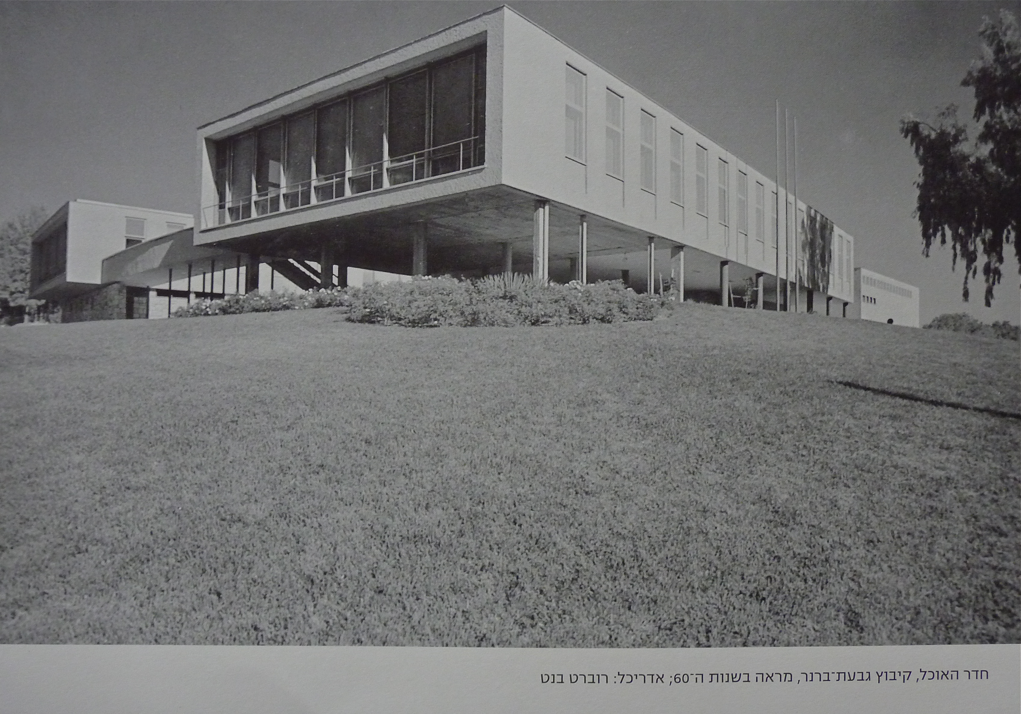 חדר אוכל-קיבוץ גבעת ברנר